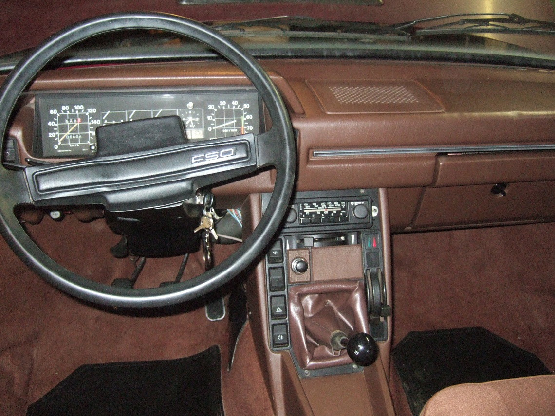 FSO Polonez MR'78, wnętrze brązowa deska rozdzielcza 1980r